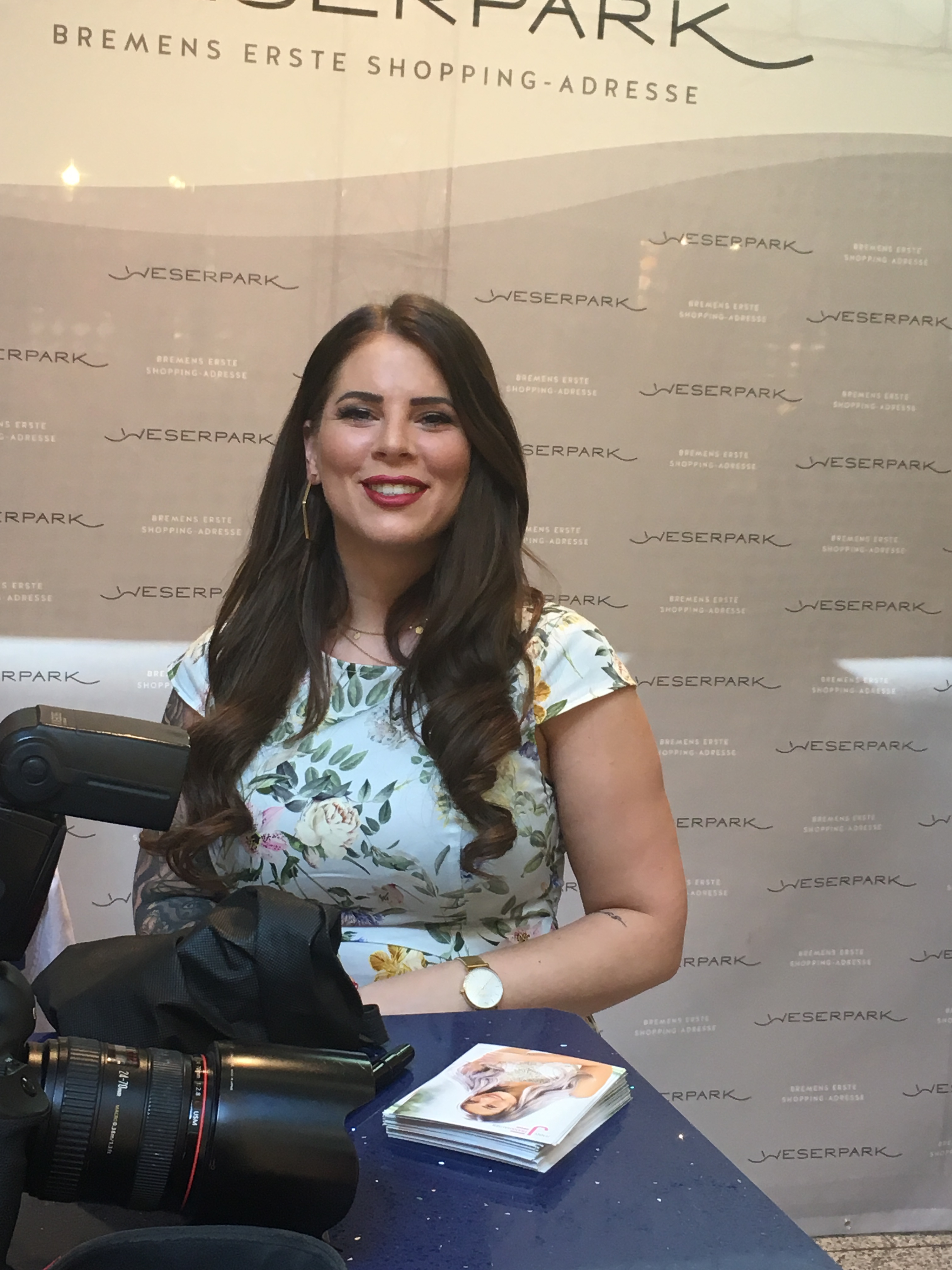 Jenny Frankhauser bei einer Autogrammstunde im Weserpark Bremen